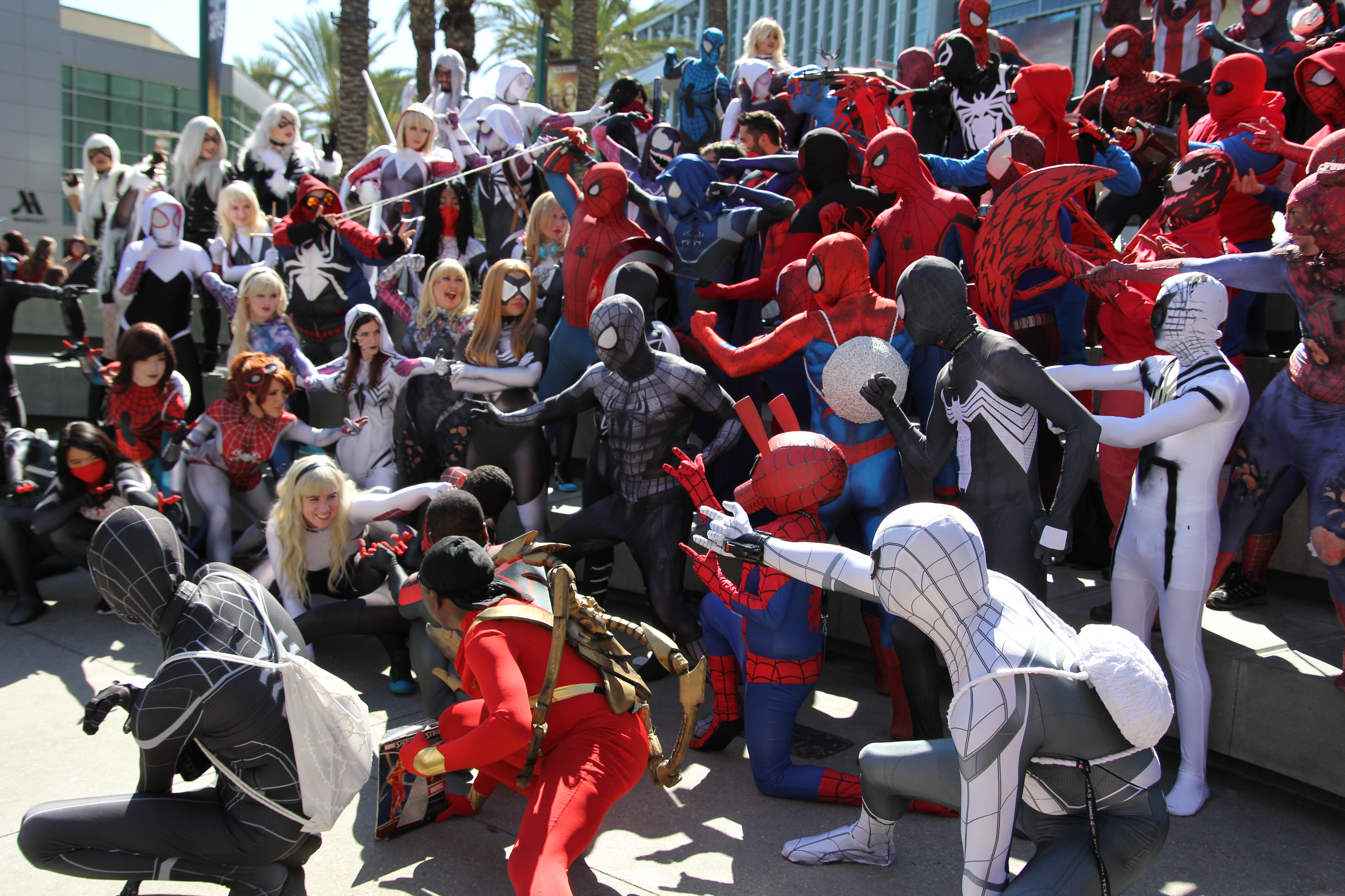 Spiderverse WonderCon 2017